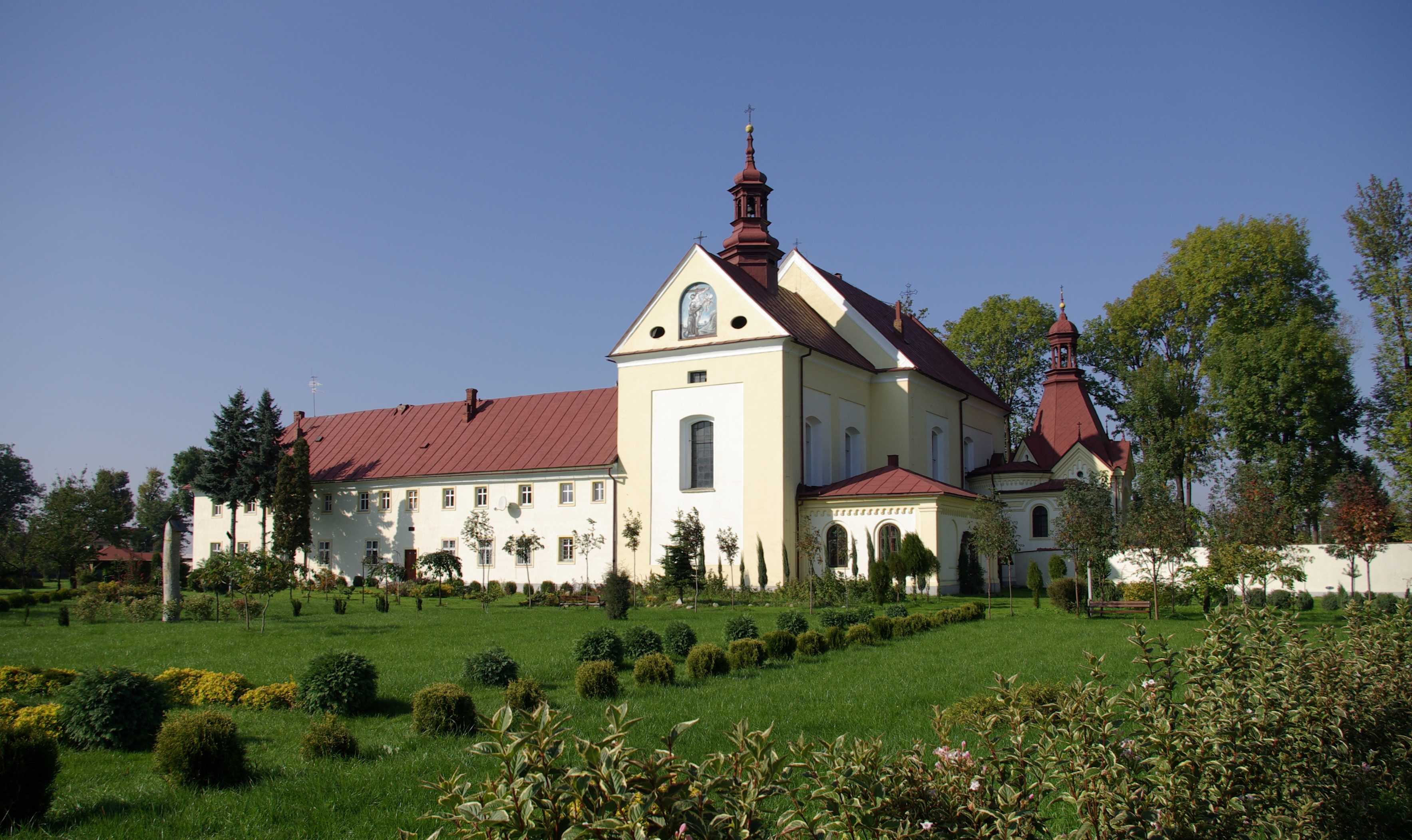 Klasztor Franciszkanów w Kętach